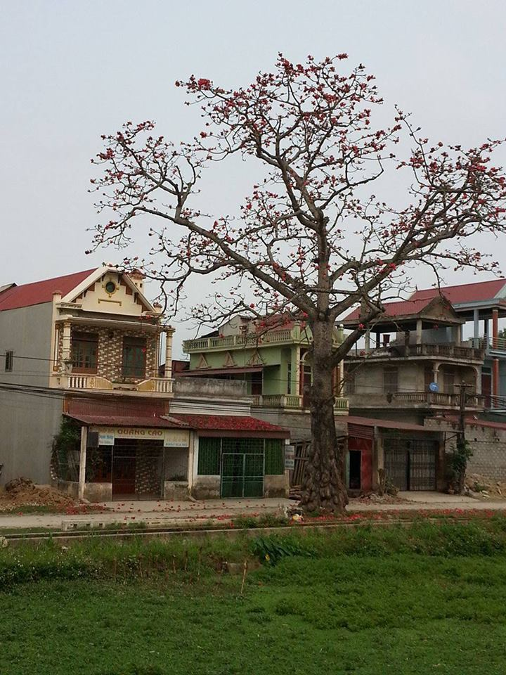 Cây Gạo đầu làng của xã chứng kiến biết bao sự kiện lịch sử của xã